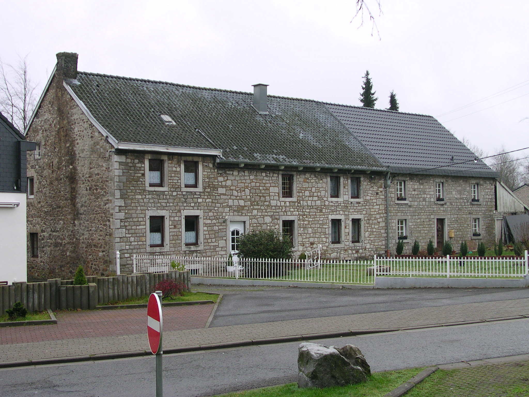 Raeren, Haus in Raeren